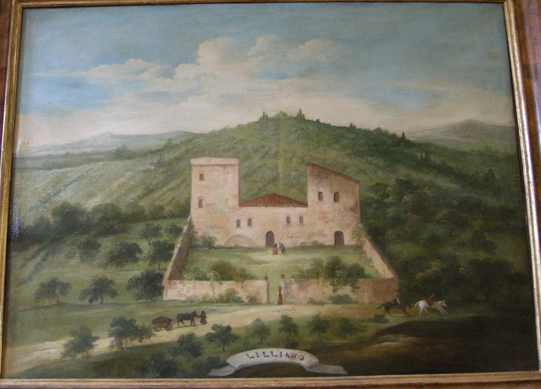 Villa di lilliano, veduta